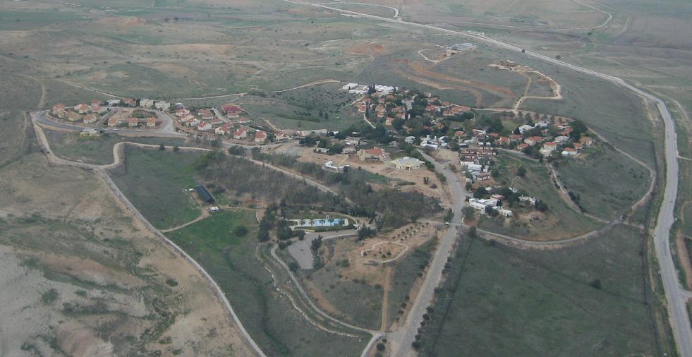 שדמות מחולה. צילום אוויר לכיוון צפון.